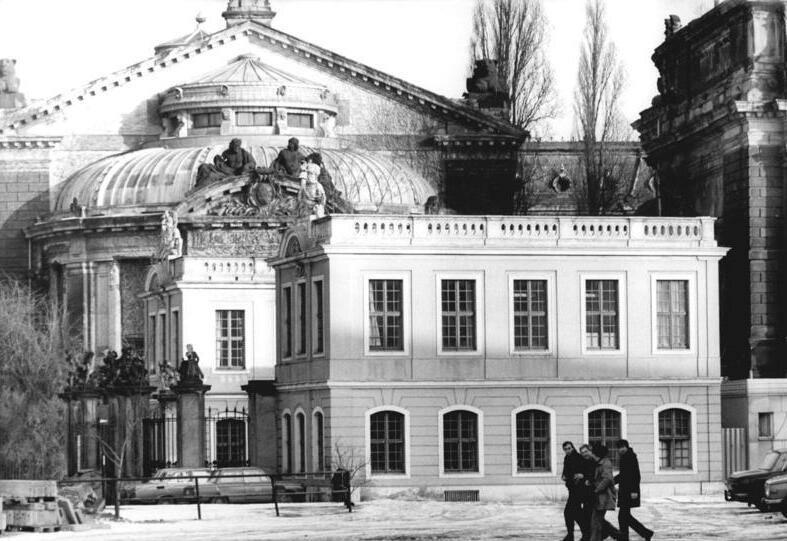 ADN-ZB-Hiekel-1.3.85 Dresden: Das schöne Detail- Hinter der Brühlschen Terrasse, unmittelbar neben der Ruine der Frauenkirche, befinden sich die von 1973 bis 1975 wiederhergestellten Torbauten des Coselschen Palais. Der 1762 bis 1764 von Julius Heinrich Schwarze für den Grafen Friedrich August von Cosel errichtete Rokoko-Bau sank 1945 in Schutt und Asche. Graf Friedrich August von Cosel war ein Sohn von August dem Starken und der Gräfin Cosel. siehe auch 1985-0301-5n